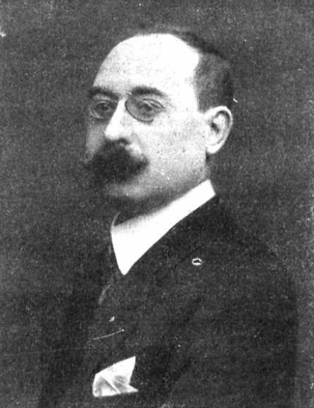 Fotografía del escritor Ricardo León realizada por Christian Franzen y publicada el 17 de enero de 1912 en Mundo Gráfico